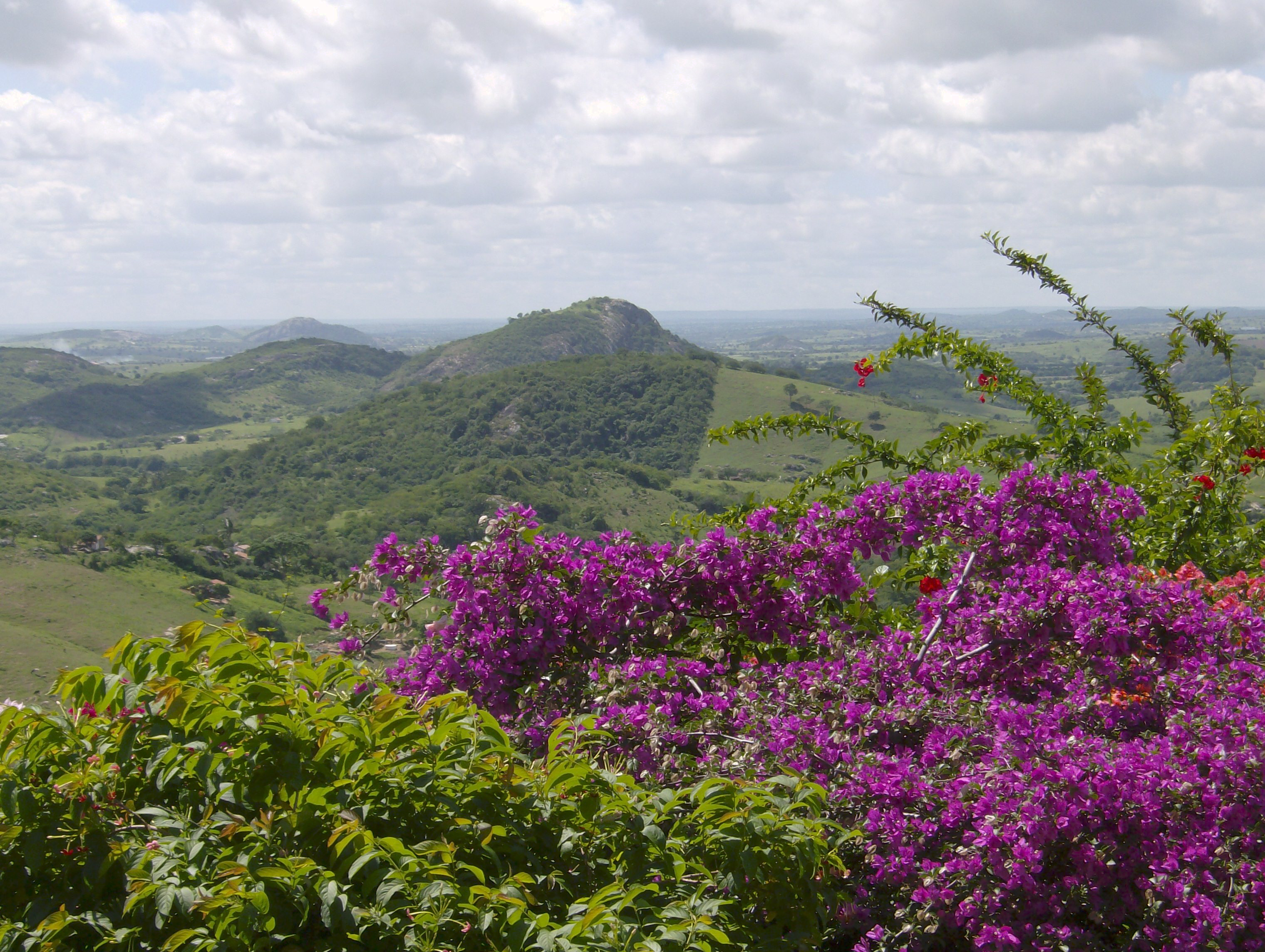 Serra da Copaóba